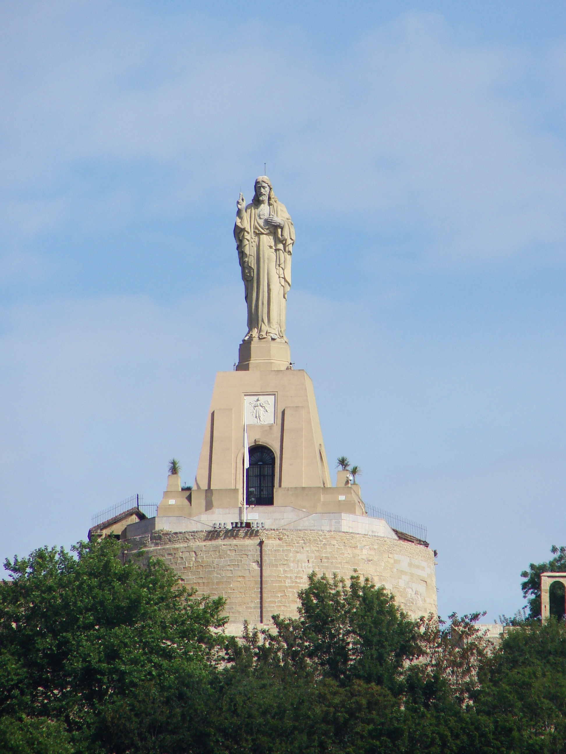 San Sebastián, province de Gipuzkoa (Espagne) : Christ au sommet du Monte Urgull